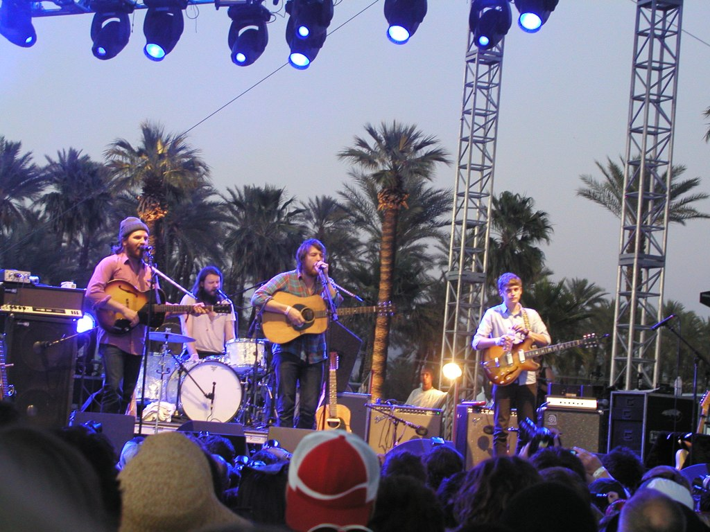 Fleet Foxes @ Coachella 2009